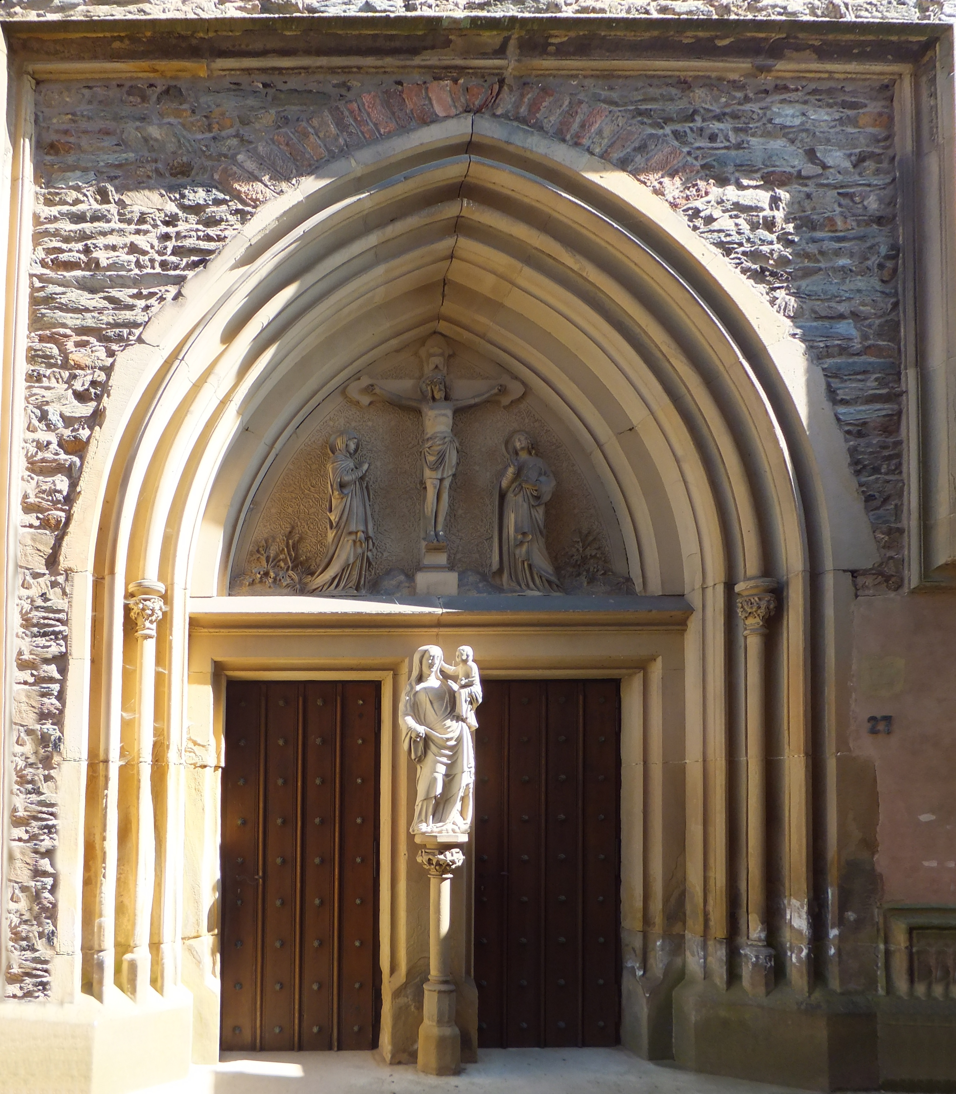 Kirche St. Laurentius in Saarburg; Portal